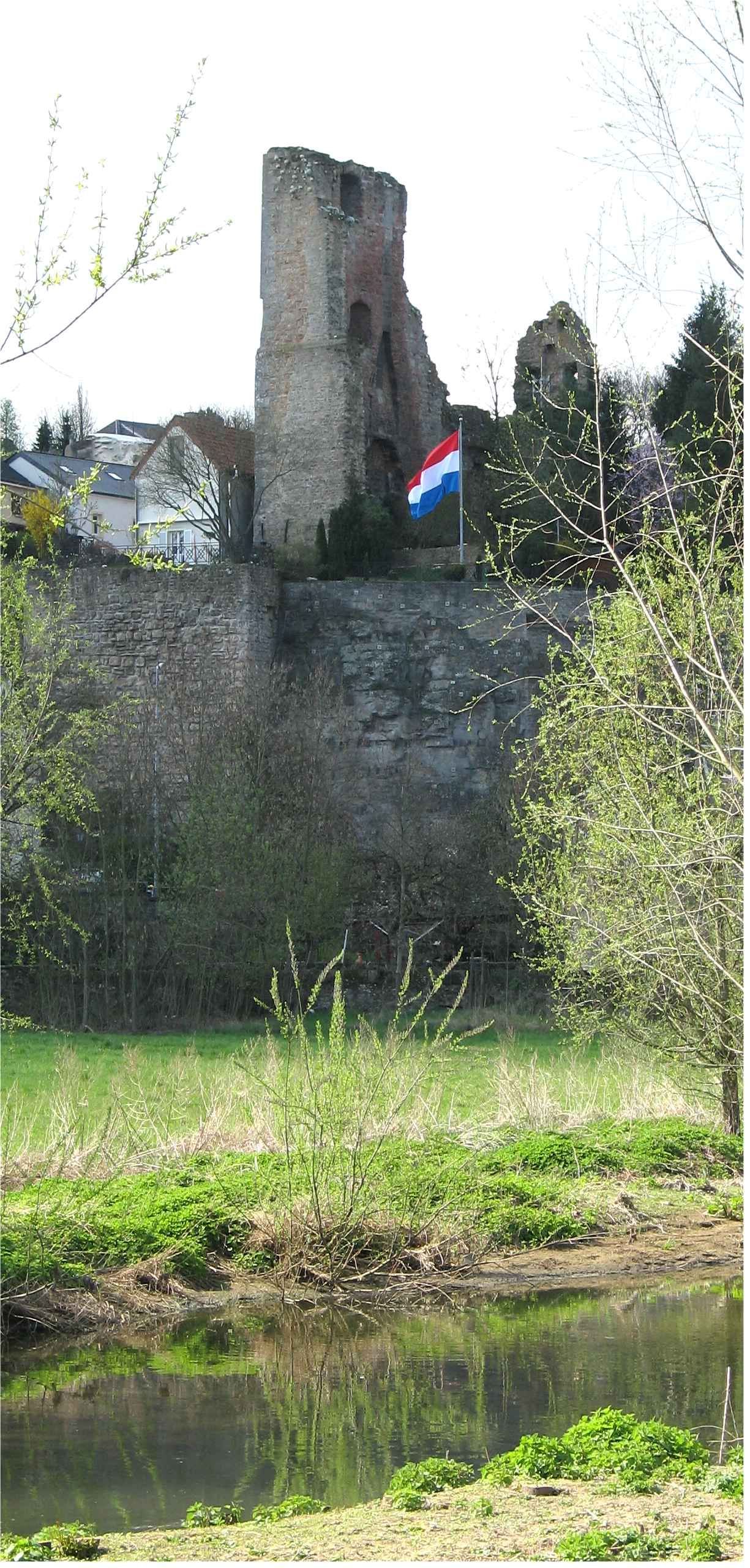 Hesper Buerg. Hesper Kategorie:Gemeng Hesper Hesper